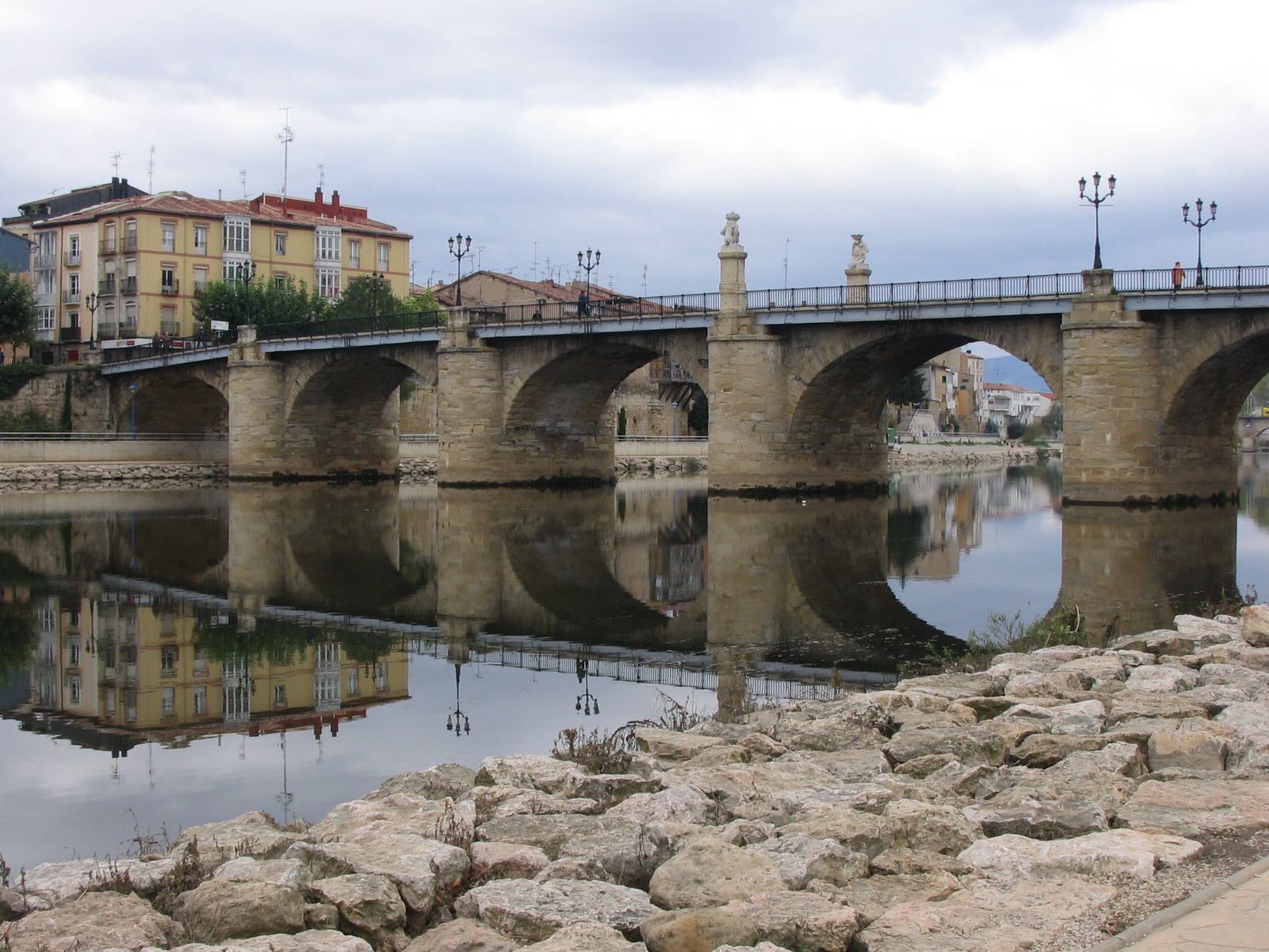 El historico puente llamado Carlos III. Cordón umbilical entre "Aquende" y "Allende". Miranda de Ebro (Burgos)